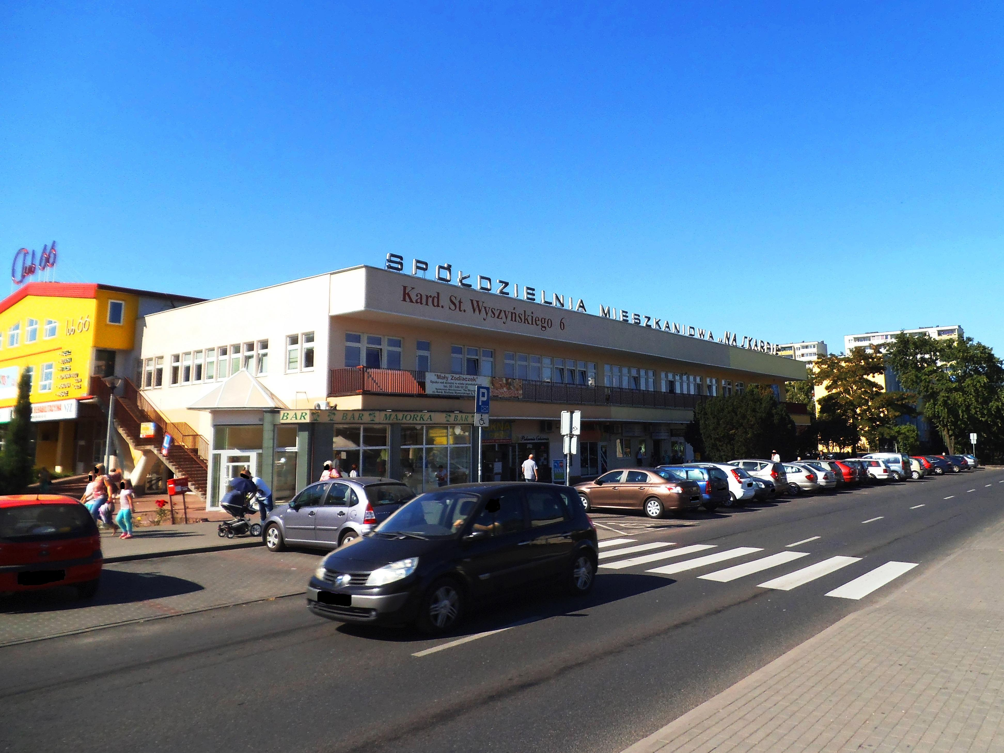 Dzielnica Na Skarpie w Toruniu